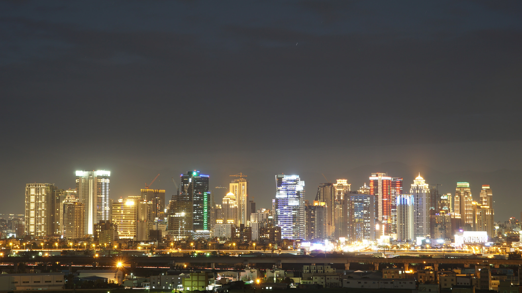 中文（台灣）: 台中七期重劃區